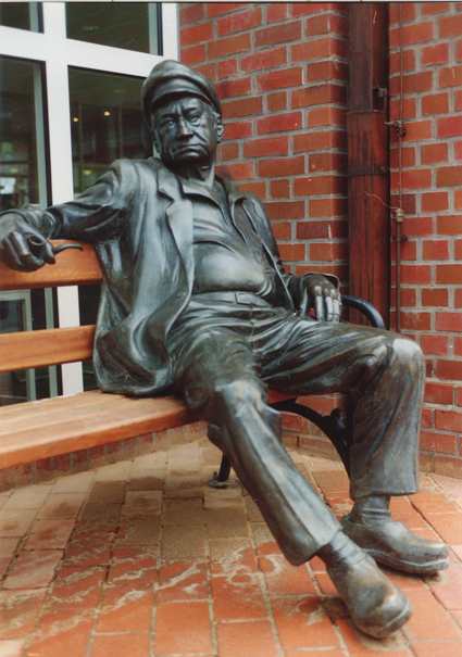 De ole Schipper von Bildhauer Carsten Eggers macht es sich in Estebrügge auf einer Bank gemütlich